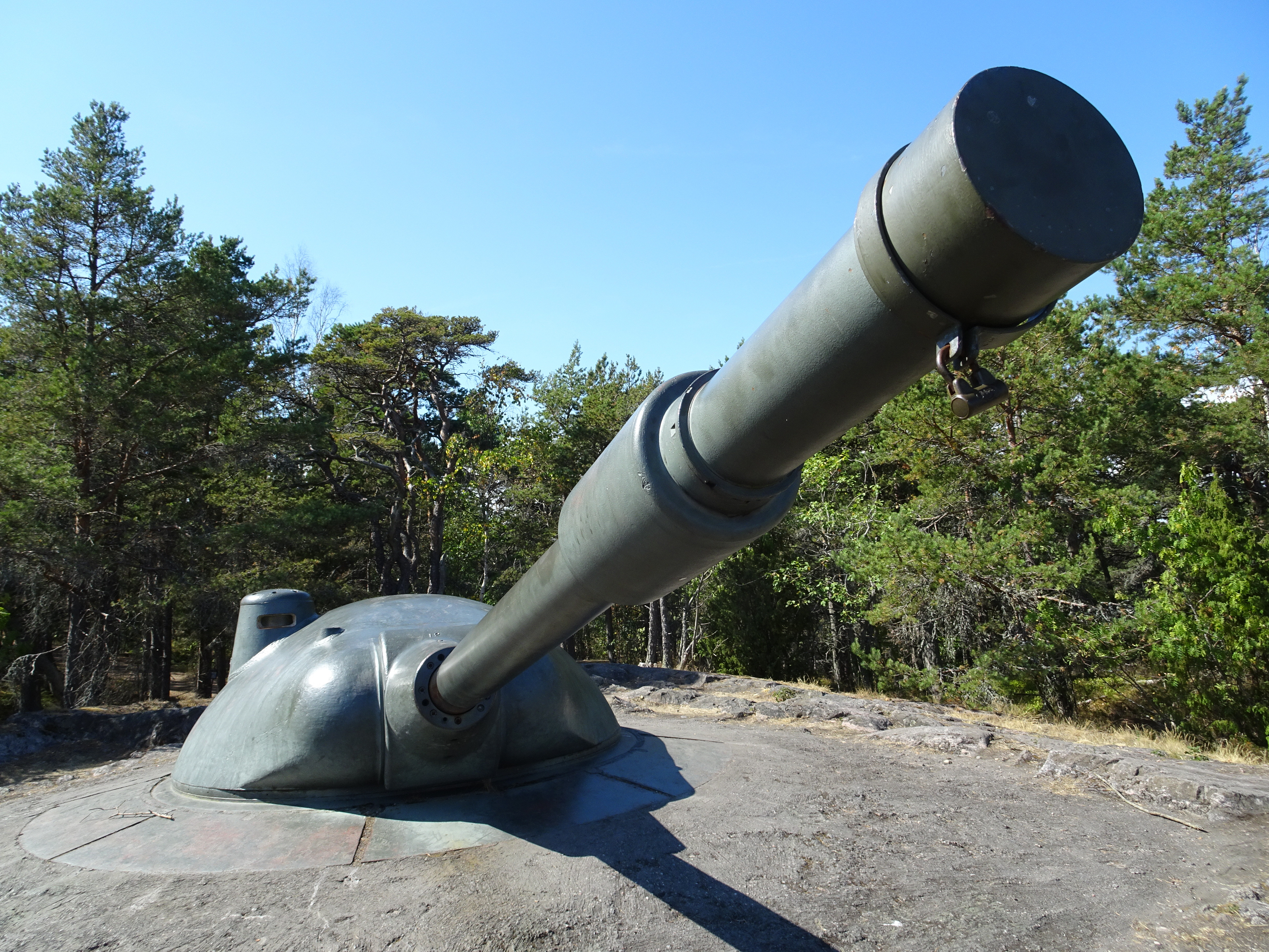 Femörefortet, 7,5 cm halvautomatisk sjömålspjäs m/57